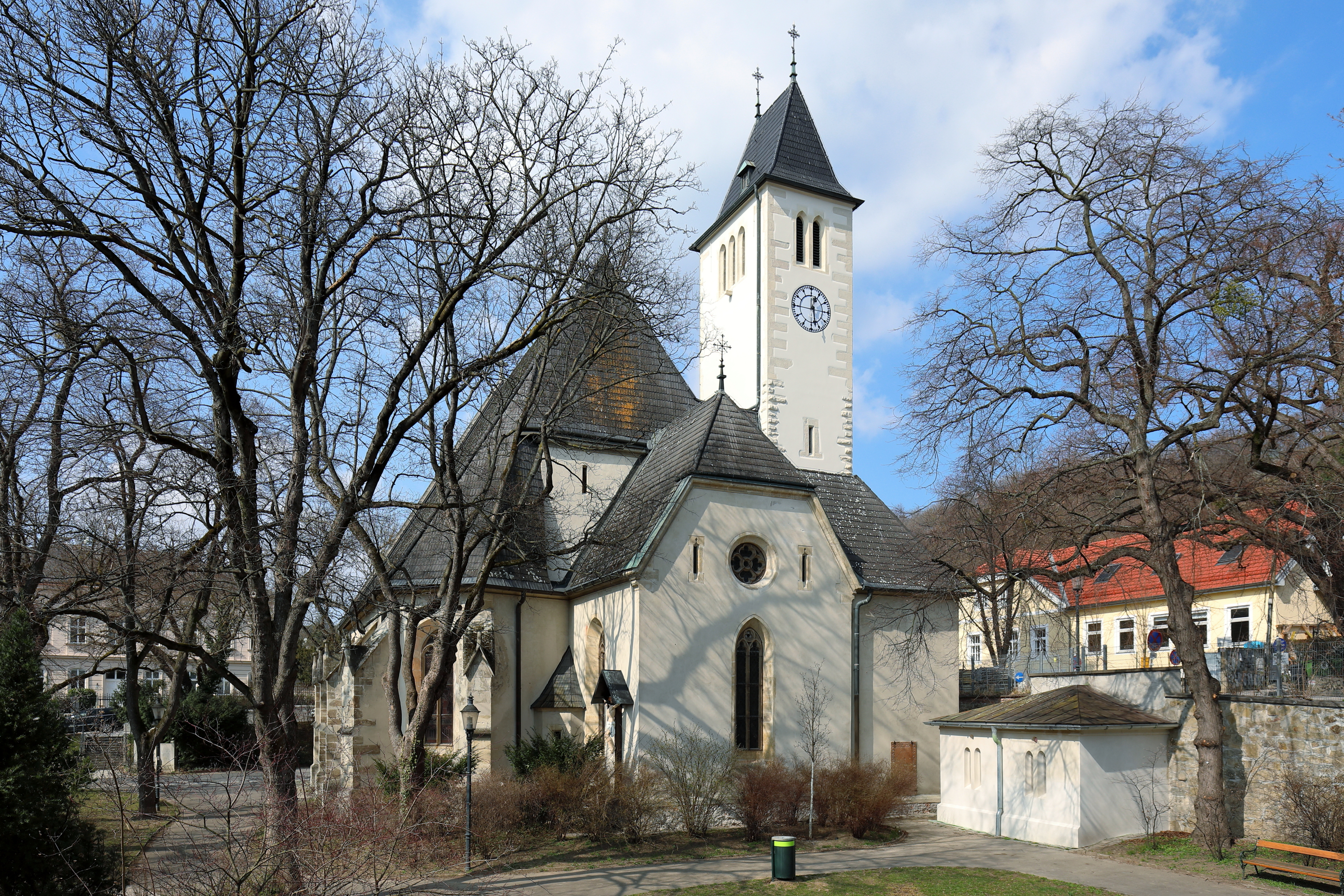 Südostansicht der Pfarrkirche St. Severin in Sievering, ein Bezirksteil des 19. Wiener Bezirkes Döbling.Eine kleine dreischiffige, gotische Dorfkirche, die 1728 renoviert und umgestaltet wurde. 1896 erfolgte ein größerer Kirchenumbau, dabei wurde unter anderem die Westfassade, das südliche Portal sowie Turm und Dach umgestaltet. Die Kirche ist von einem kleinen Park umgeben, der früher ein Friedhof war.